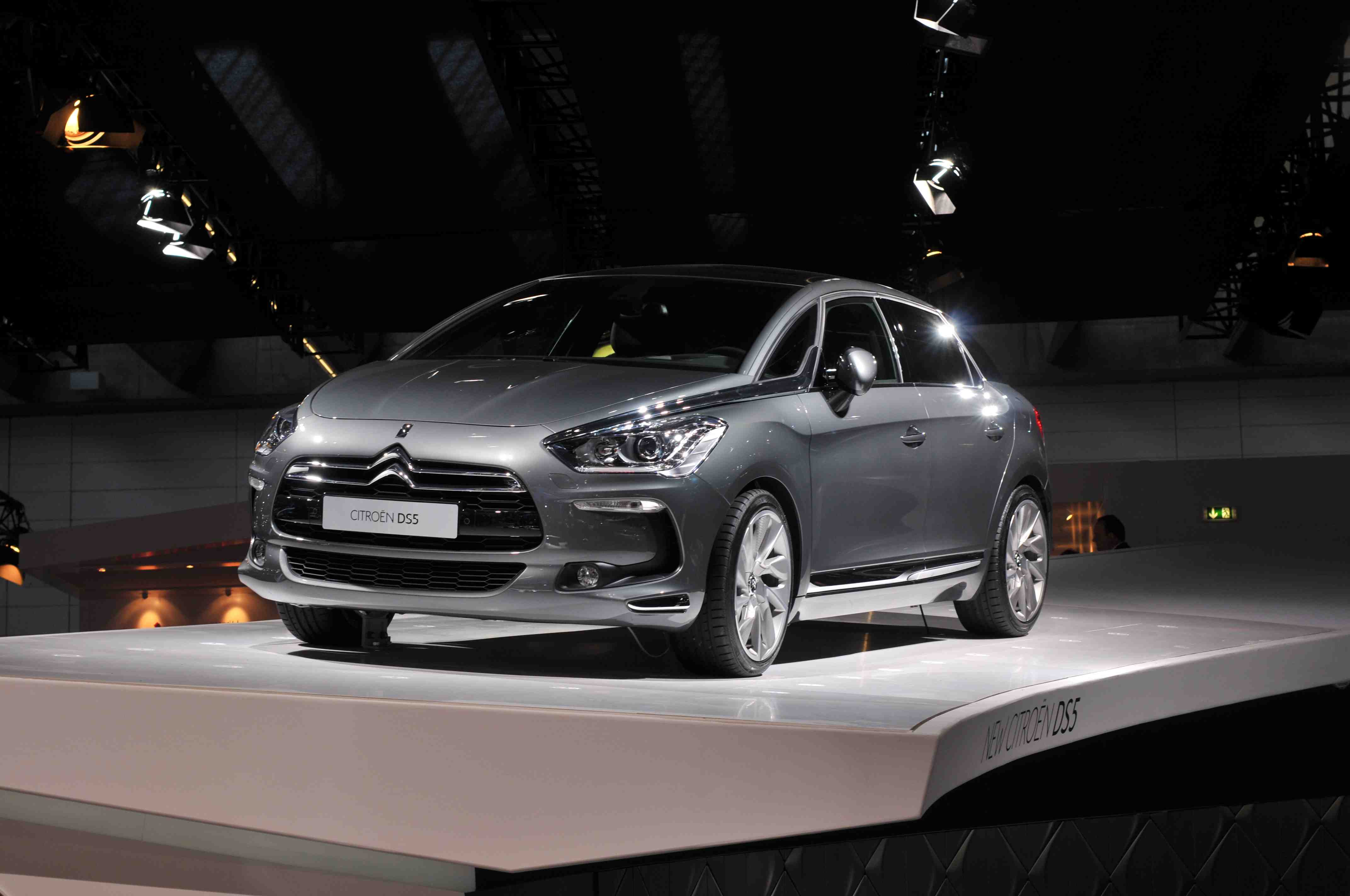 IAA 2011 - Internationale Automobilausstellung in Frankfurt/Main